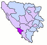 BosniaCanton WestHerzegovina